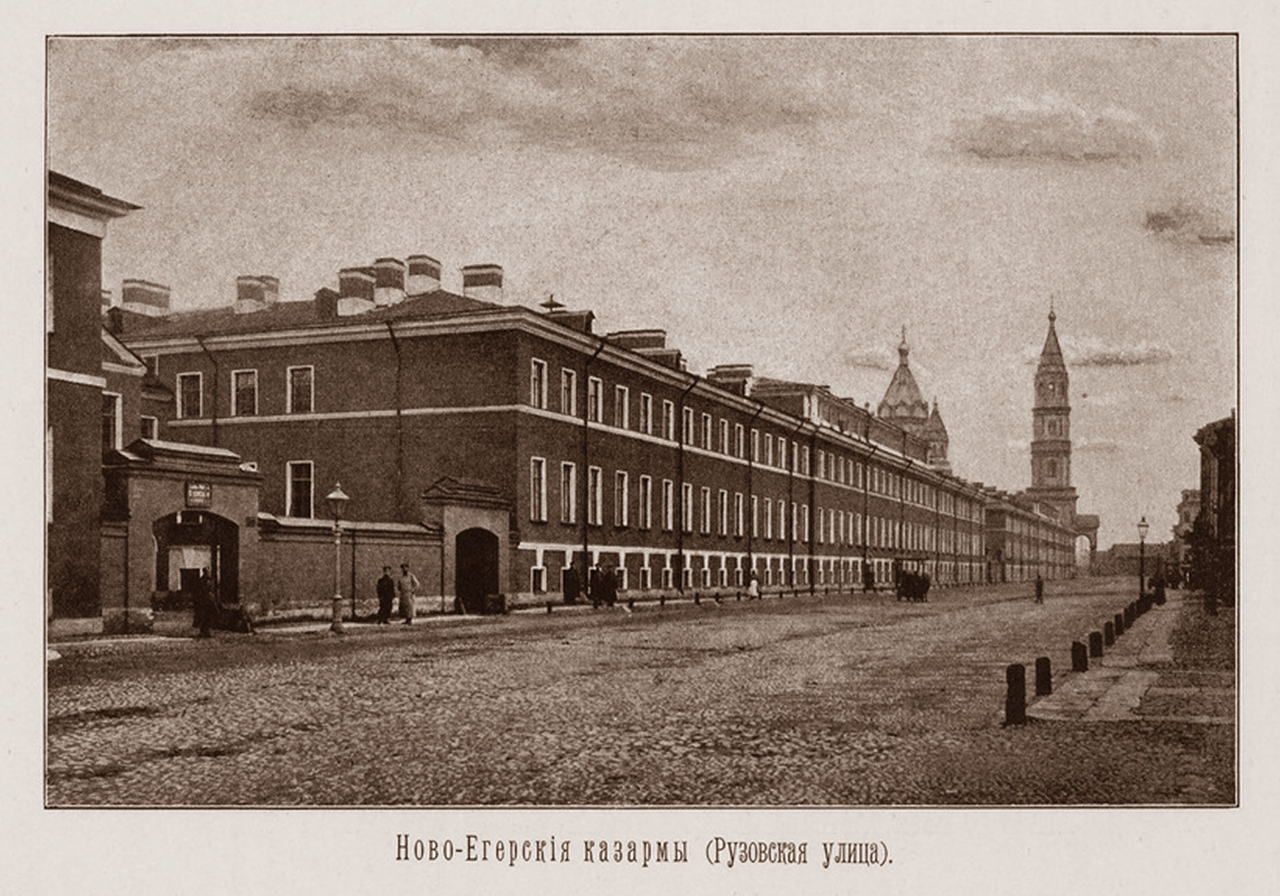 Це́рковь во имя Святого великомученика Мирония на набережной Обводного канала Санкт-Петербурга (построен 1849–1855, 1934 срыван), полковой храм Лейб-гвардии Егерский Его Величества полкa, со стороны Рузовской ул., Россия 1896-е годы.